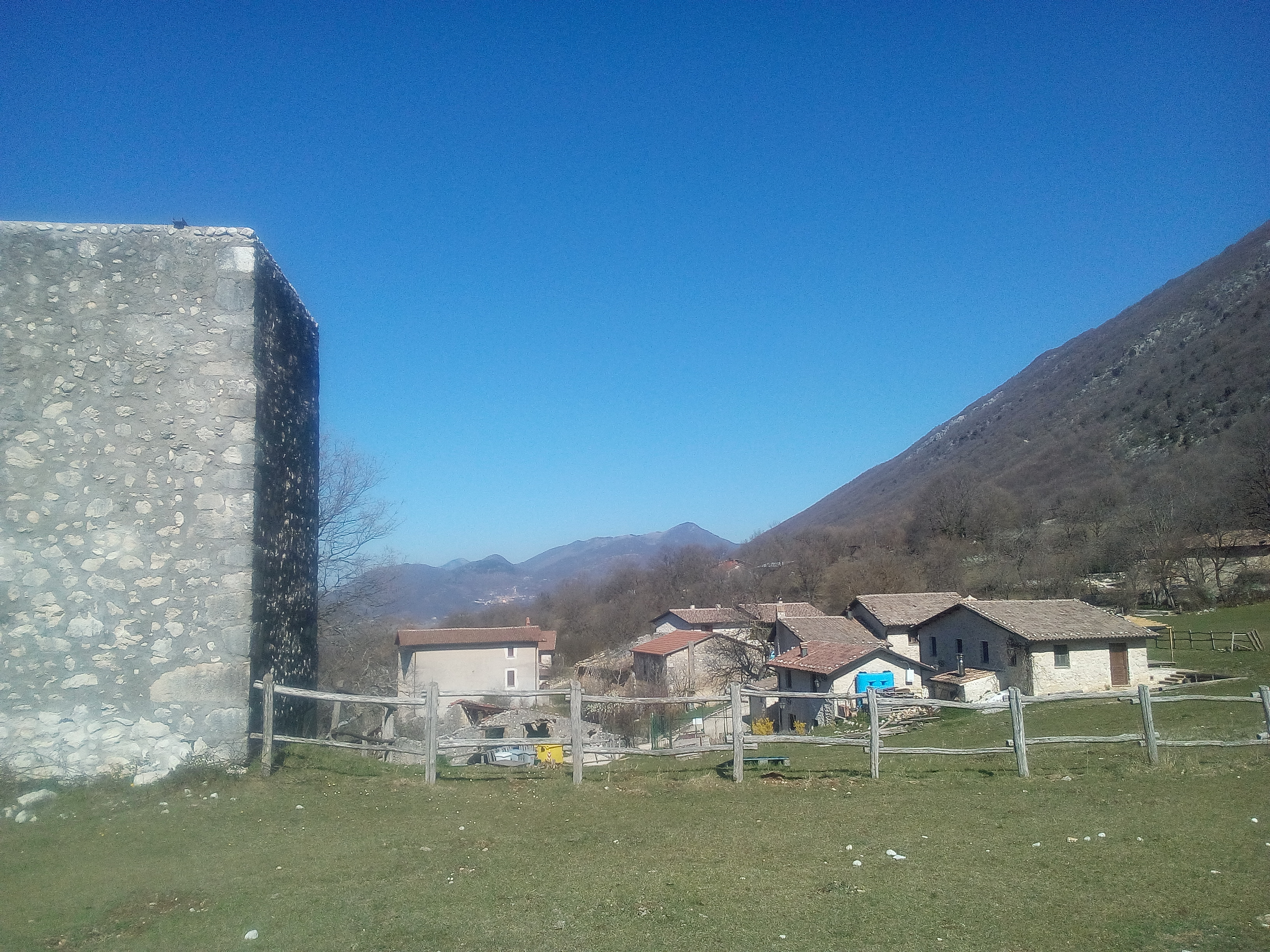 Spunto del borgo di Cartore